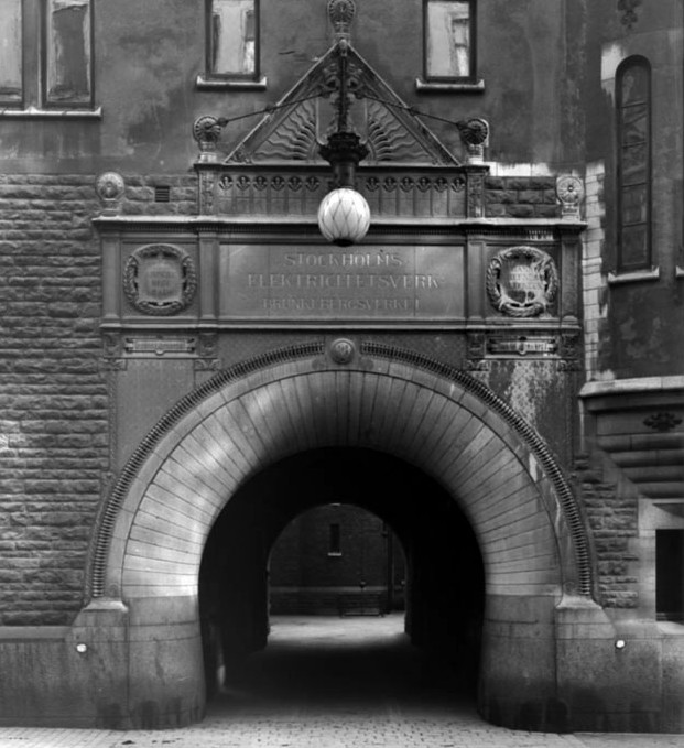 Entré till Brunkebergsverket på Östermalm, Stockholm